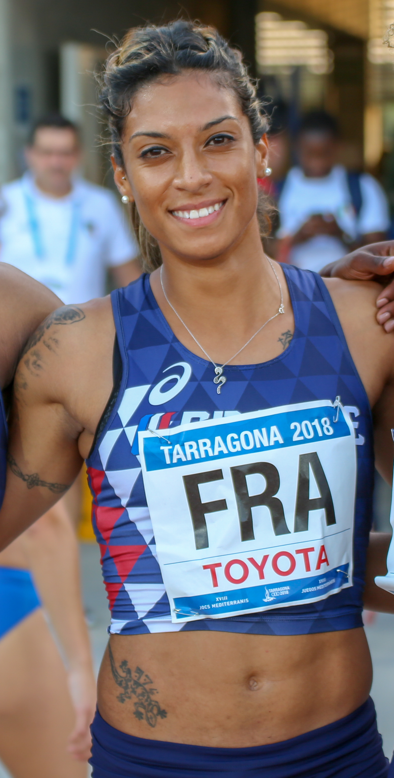 Jennifer Galais en los relevos 4x100 en los Juegos del Mediterráneo 2018